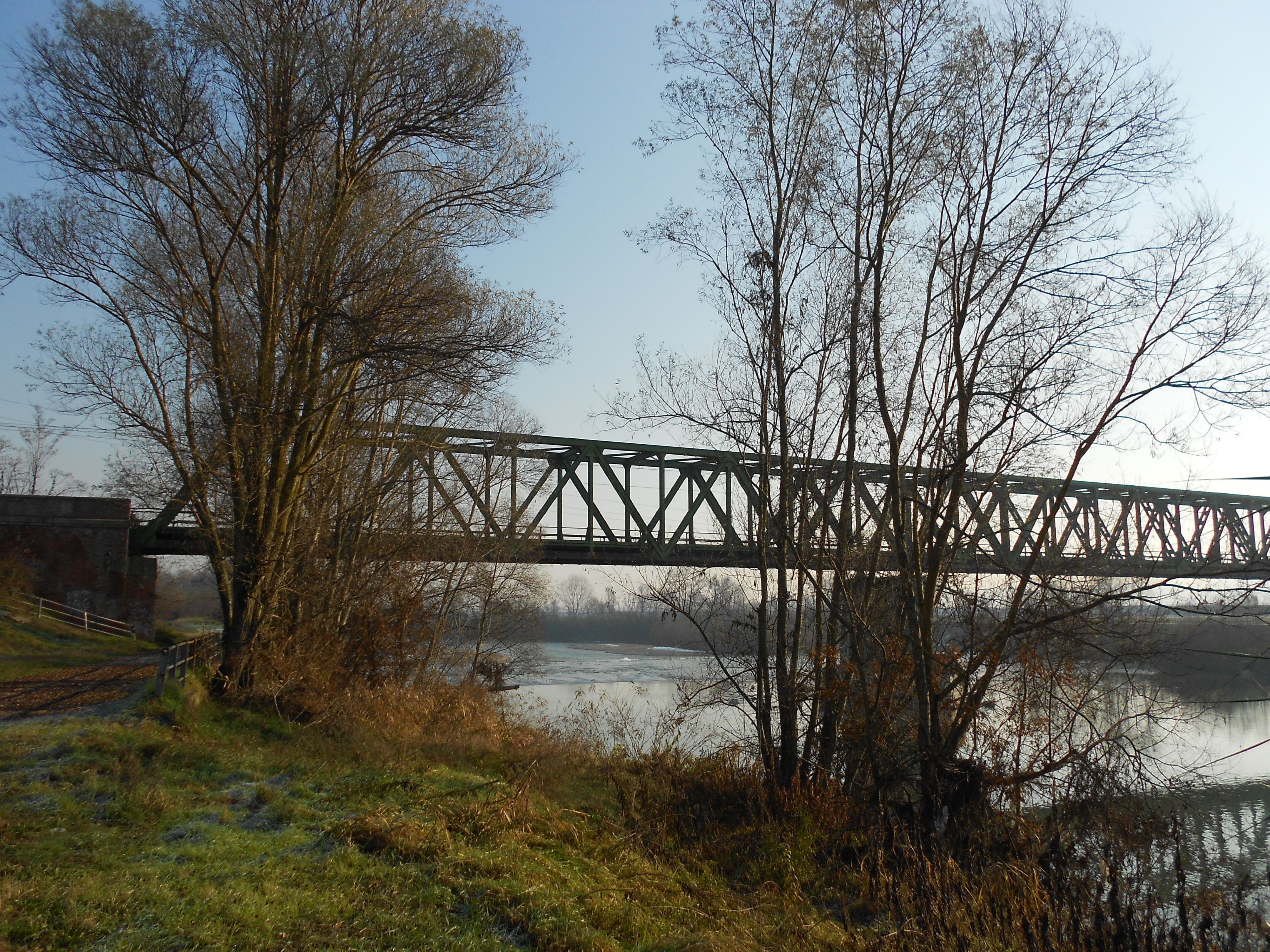 il ponte sul fiume Tanaro della ferrovia Asti-Acqui Terme, presso Asti